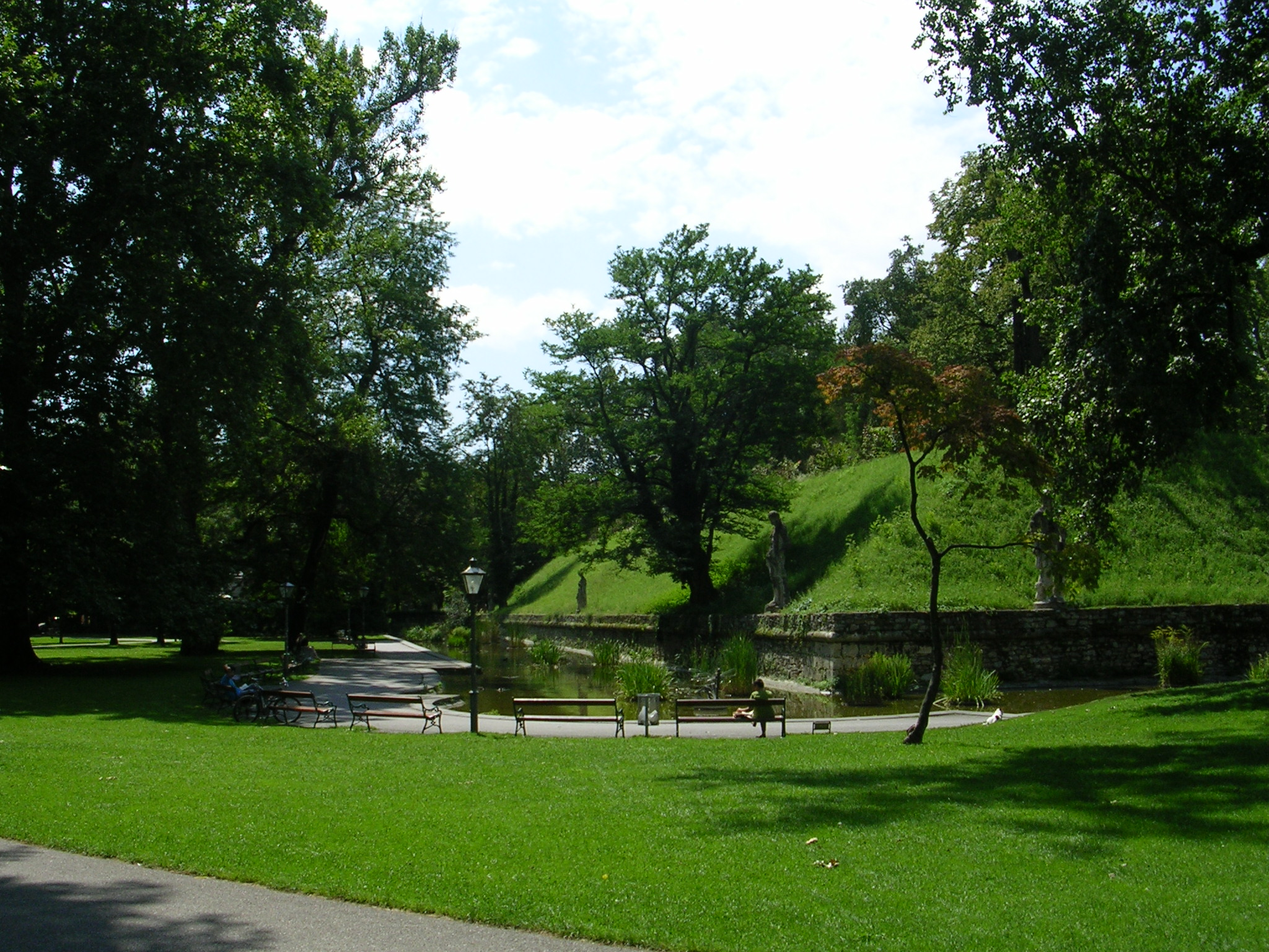 Stadtpark Graz